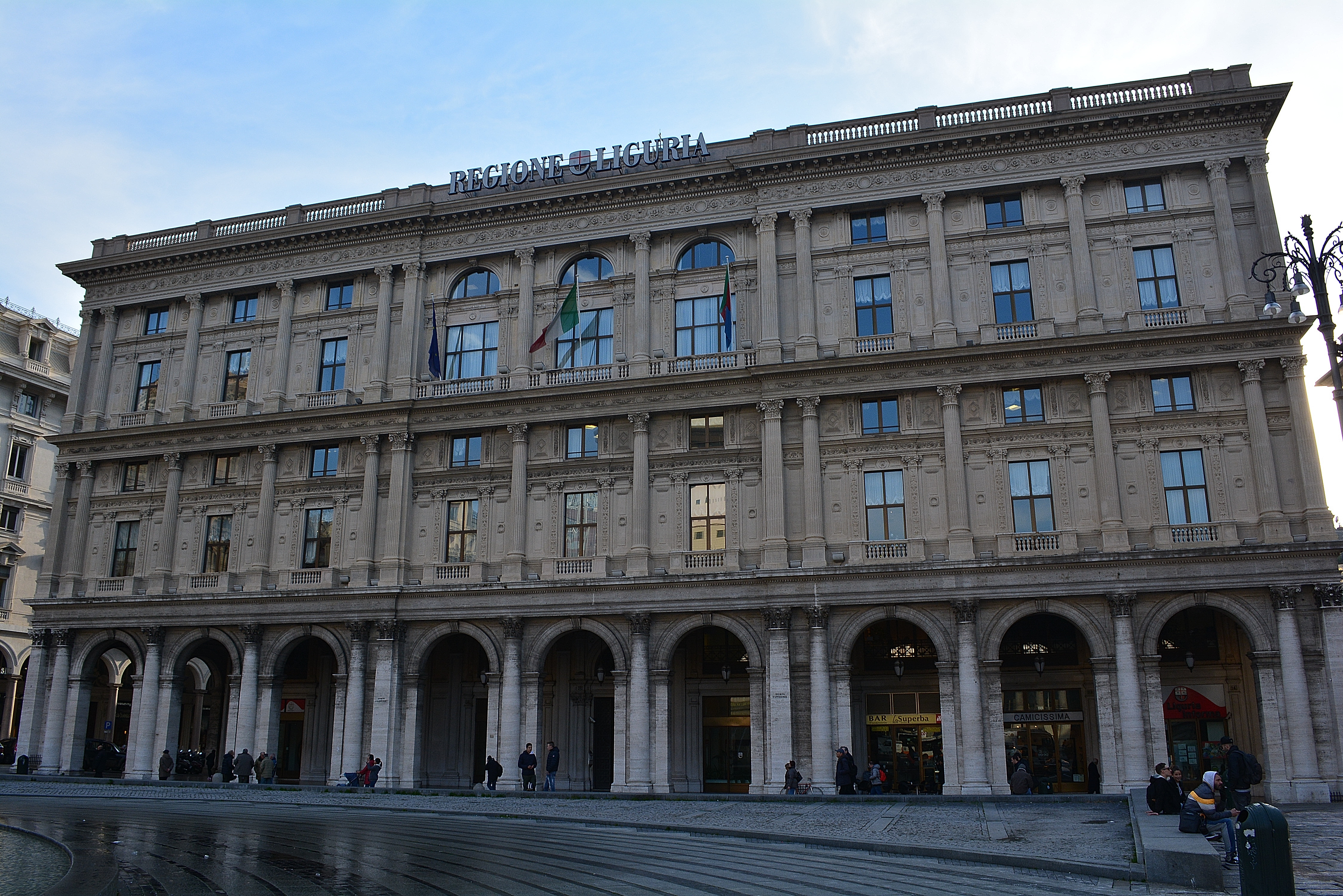 Fontana di Piazza De Ferrari This is a photo of a monument which is part of cultural heritage of Italy.